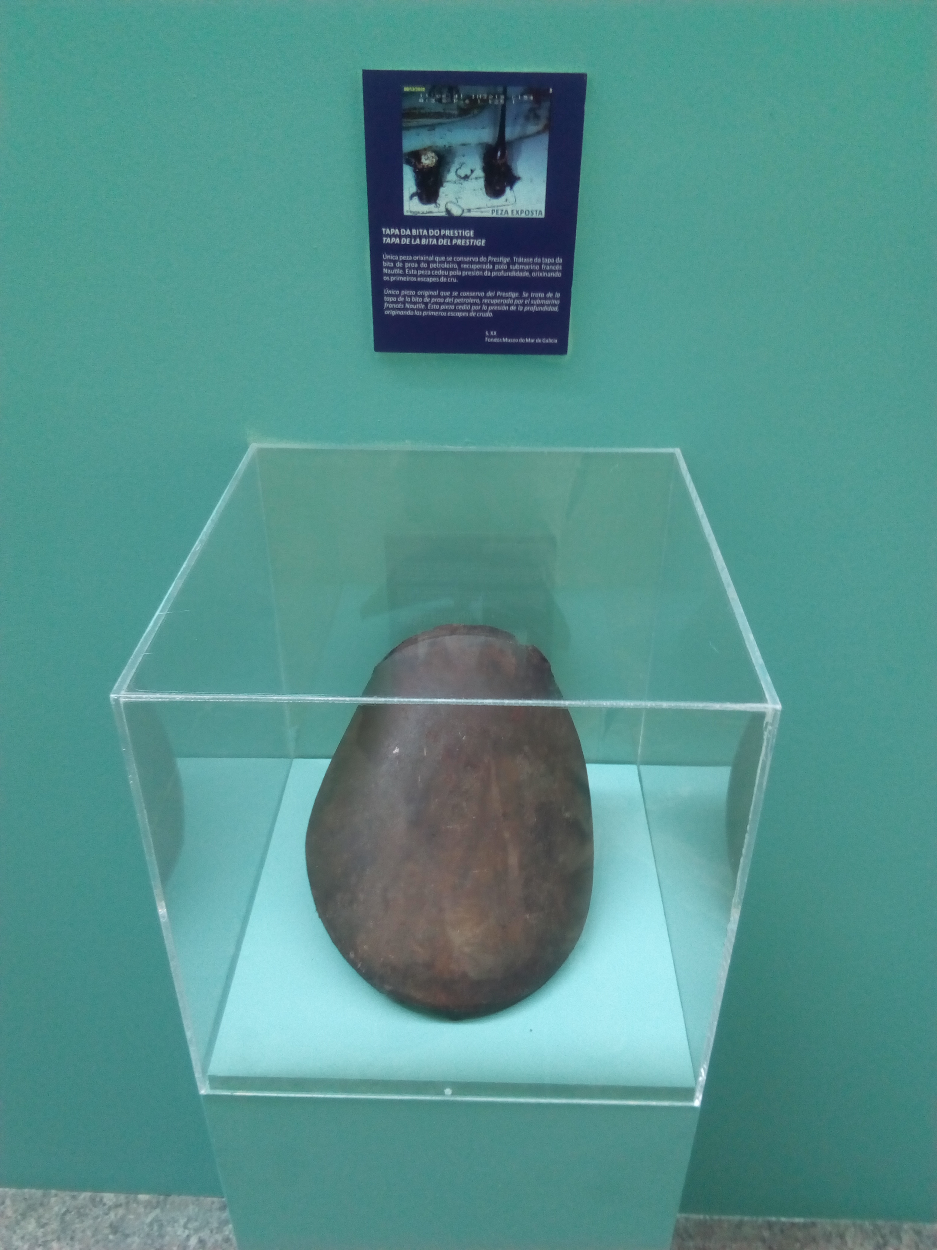 tapa de la bita del buque prestige, única pieza rescatada del hundimiento.